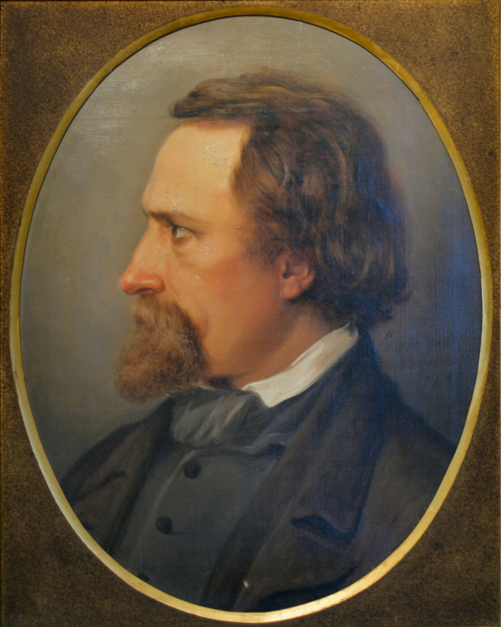 maleri af Elisabeth Jerichau Baumann: Jens Adolf Jerichau, 1853, 44,5 x 34,5 cm